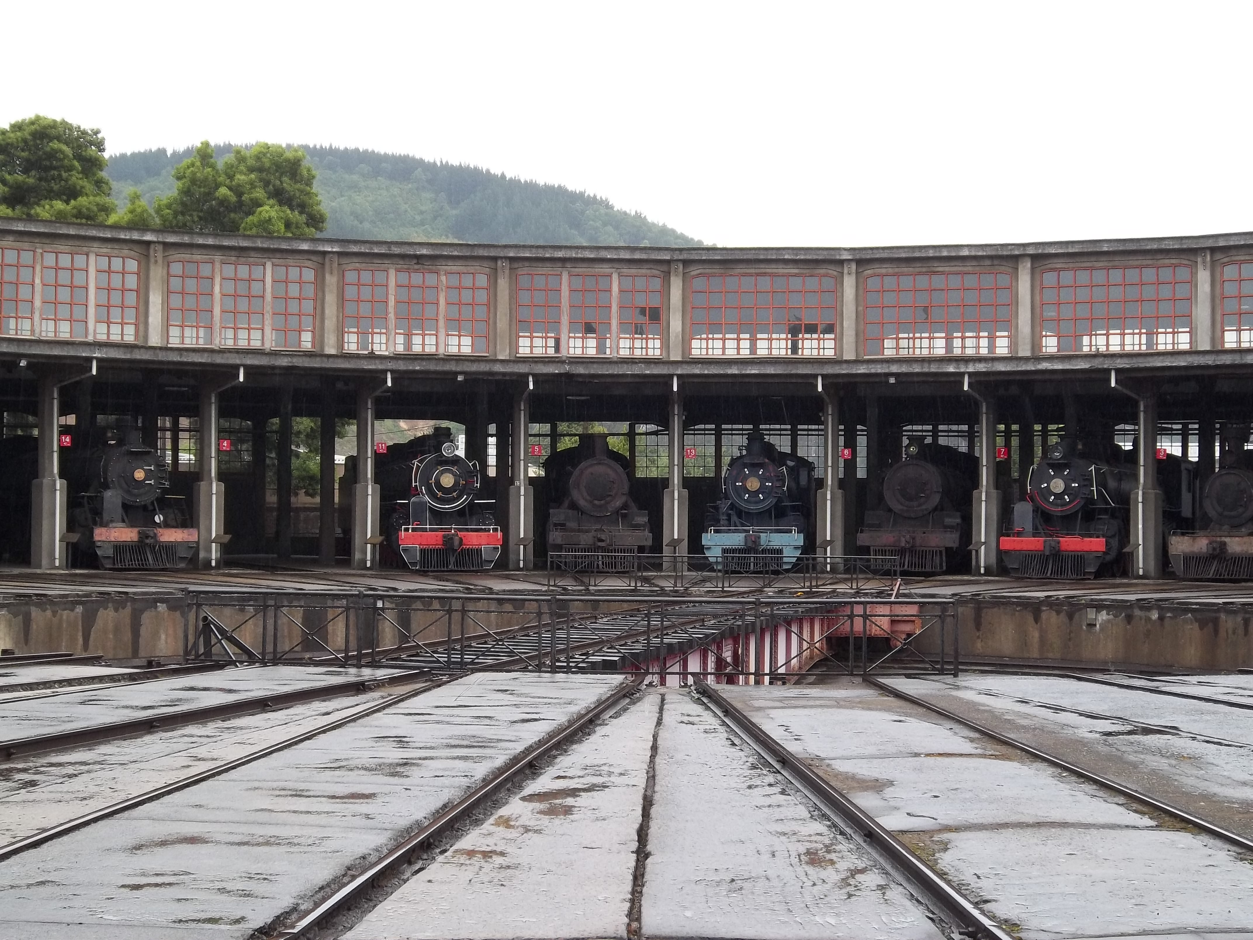 Locomotoras a vapor en el museo ferroviario Pablo Neruda, Temuco, Región de la Araucanía, Chile.